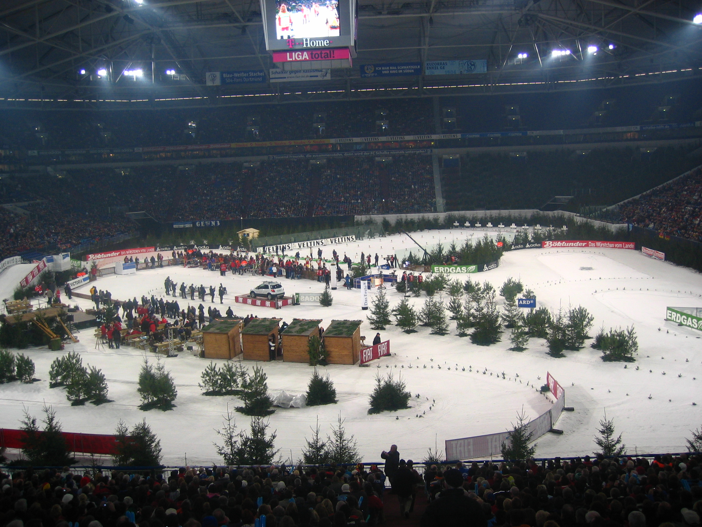 Biathlon in der Veltins-Arena auf Schalke, Gelsenkirchen